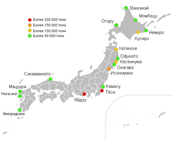 Рыболовные порты Японии